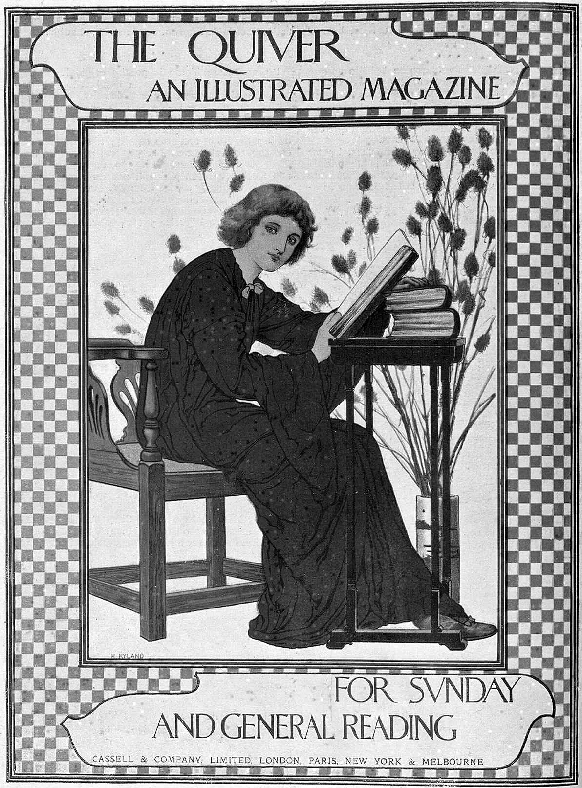 Cartel del periódico ilustrado The Quiver, de Henry Ryland, en la revista española Pluma y Lápiz.